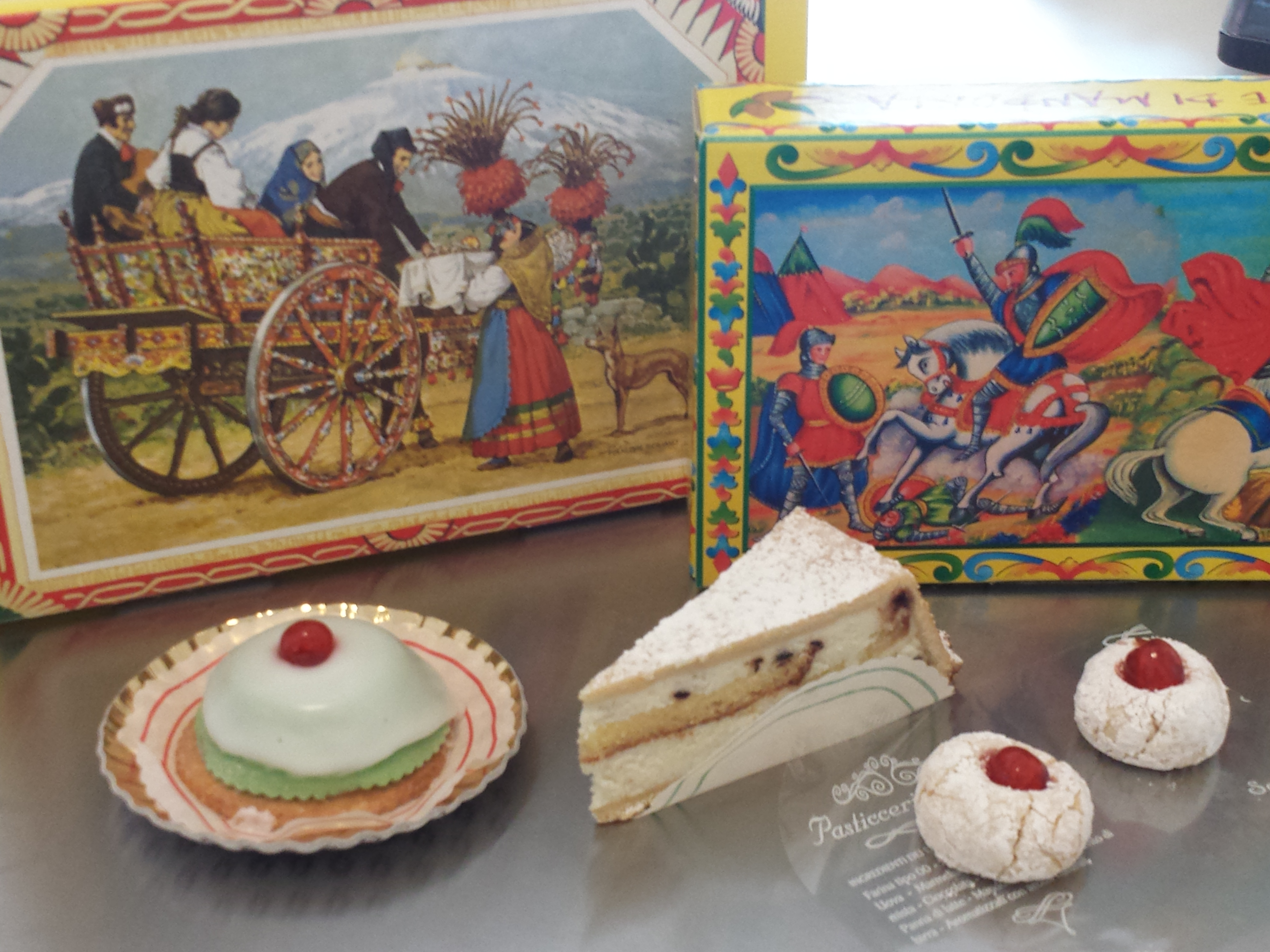 i tesori della pasticceria siciliana. Cassatine , cassata al forno (detta anche cassata rustica) e i biscotti di mandorla e molti altri...